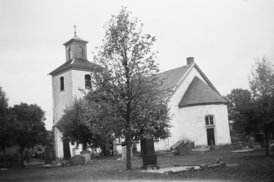 Kyrkan från sydöst. Före restaurering.